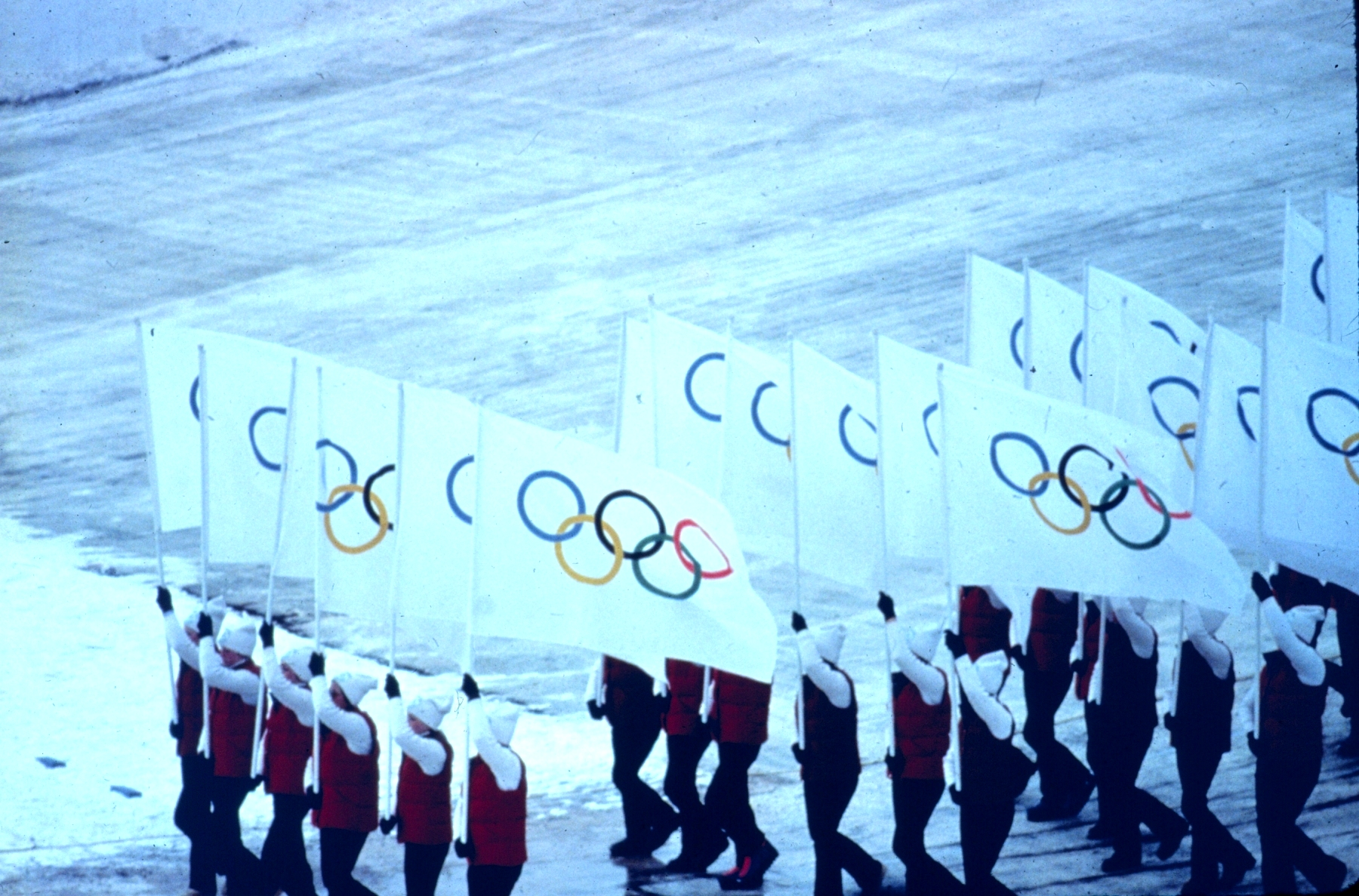 Olympische Fahnen bei der Eröffnungs- oder Schlussfeier während der Olympischen Winterspiele 1980 in Lake Placid.